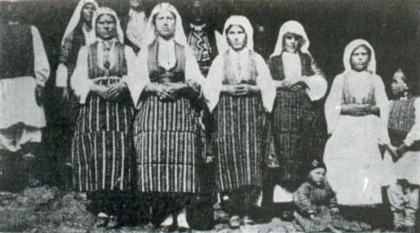 Македонки од с. Калишта, Охридско. фотографија објавена од Ритих во Русија 1909 година